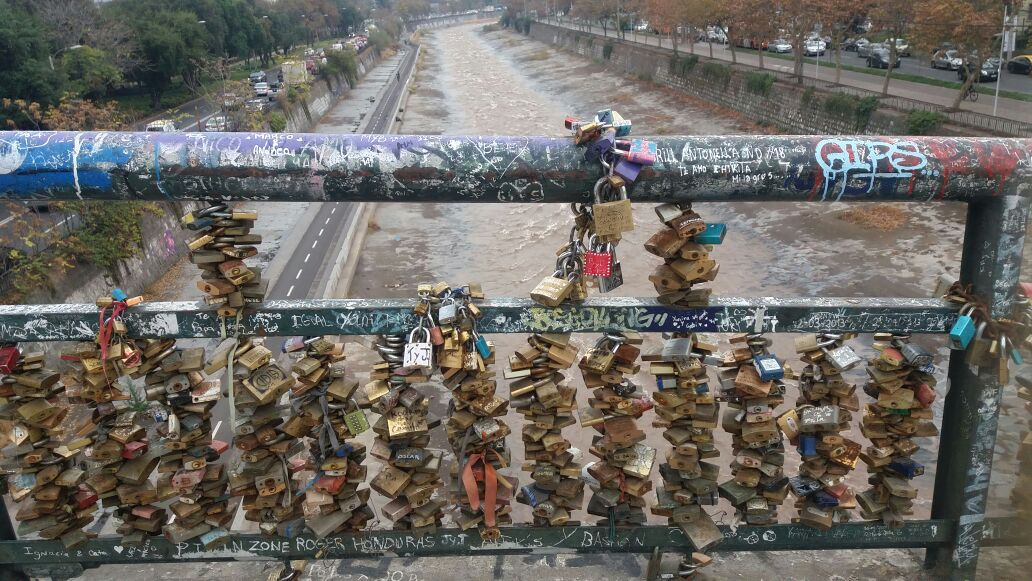 Candados en el puente peatonal Condell, llamado también Racamlac, que une el parque Balmaceda y la avenida Andrés Bello con la avenida Santa María en la comuna de Providencia, Santiago de Chile. Vista hacia el poniente.